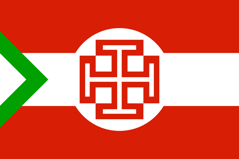 Kruckenkreuzflagge der Vaterländischen Front